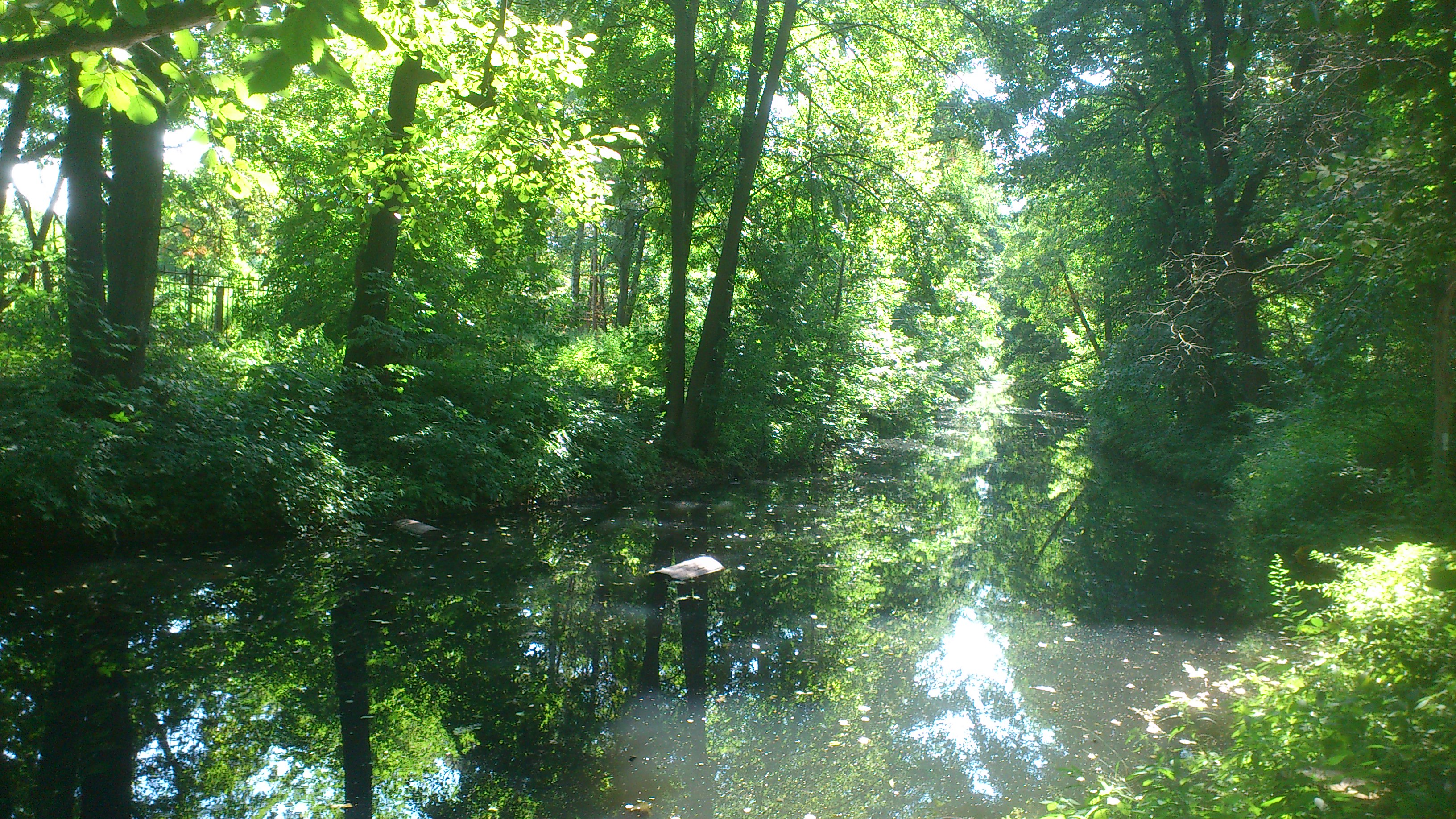 Река Жабенка.